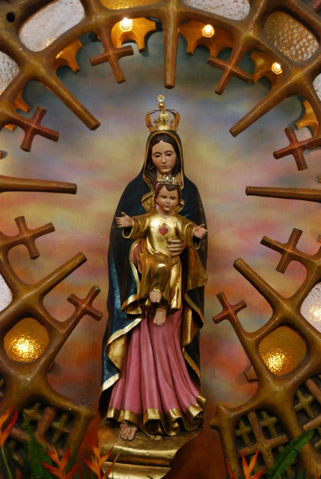 Imagen Frontal de Nuestra Señora de la Aurora